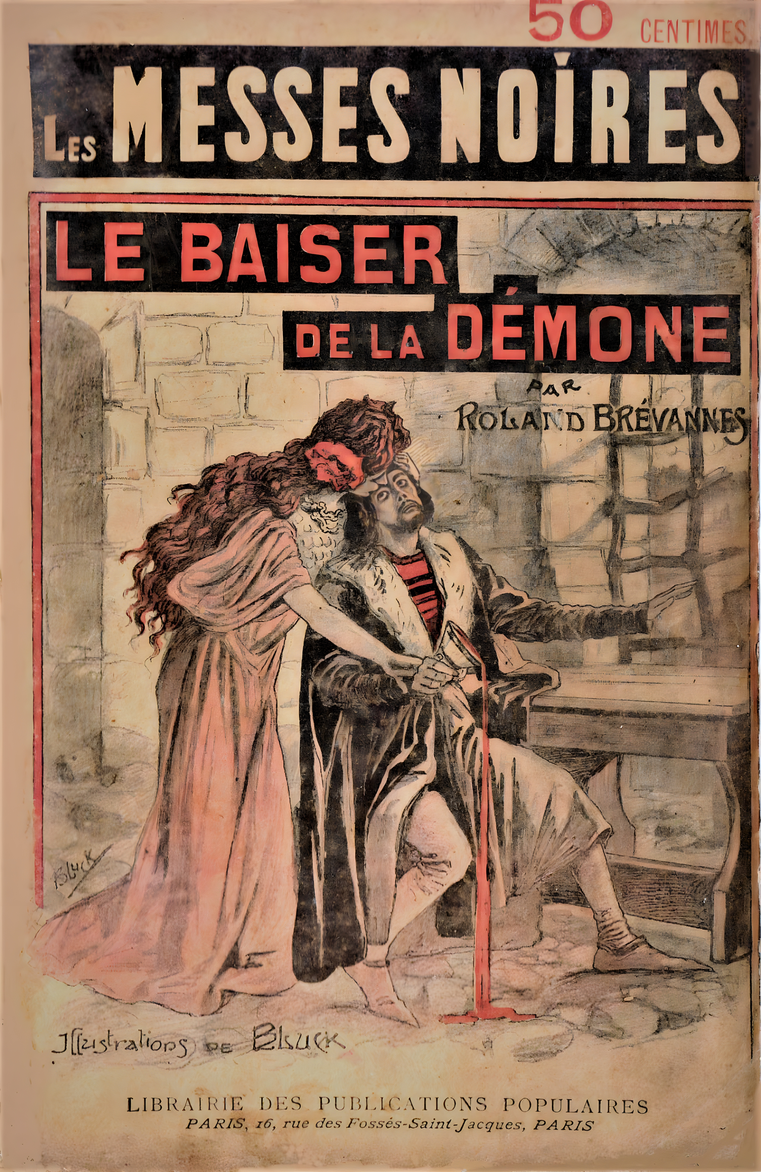 Roland Brévannes, Le Baiser de la démone (série Les Messes noires), Paris, Librairie des publications populaires, 1906 ?